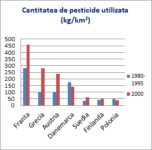 Utilizarea pesticidelor in (kg/km²)